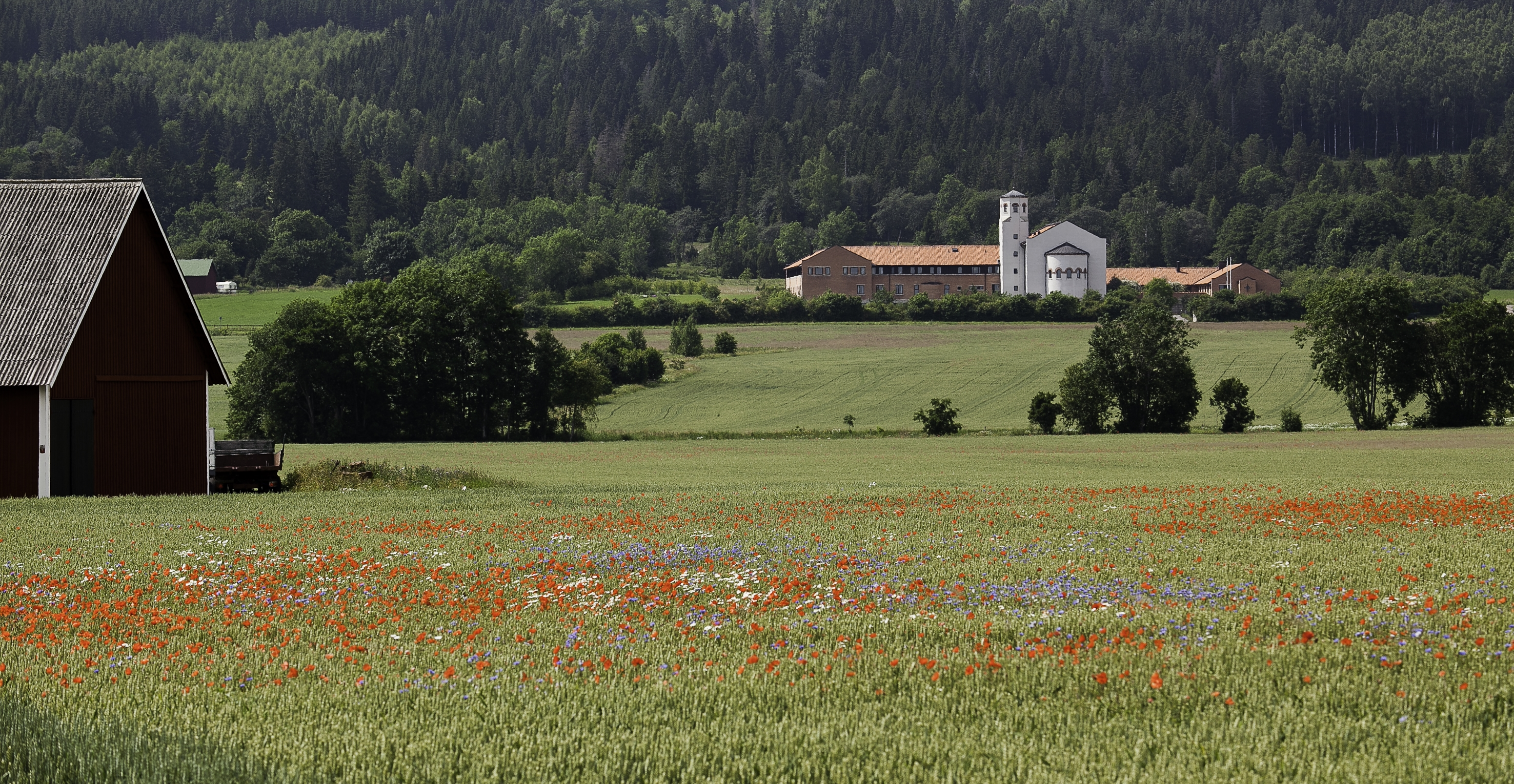 Heliga Hjärtas Kloster, foto: I Hagerfors